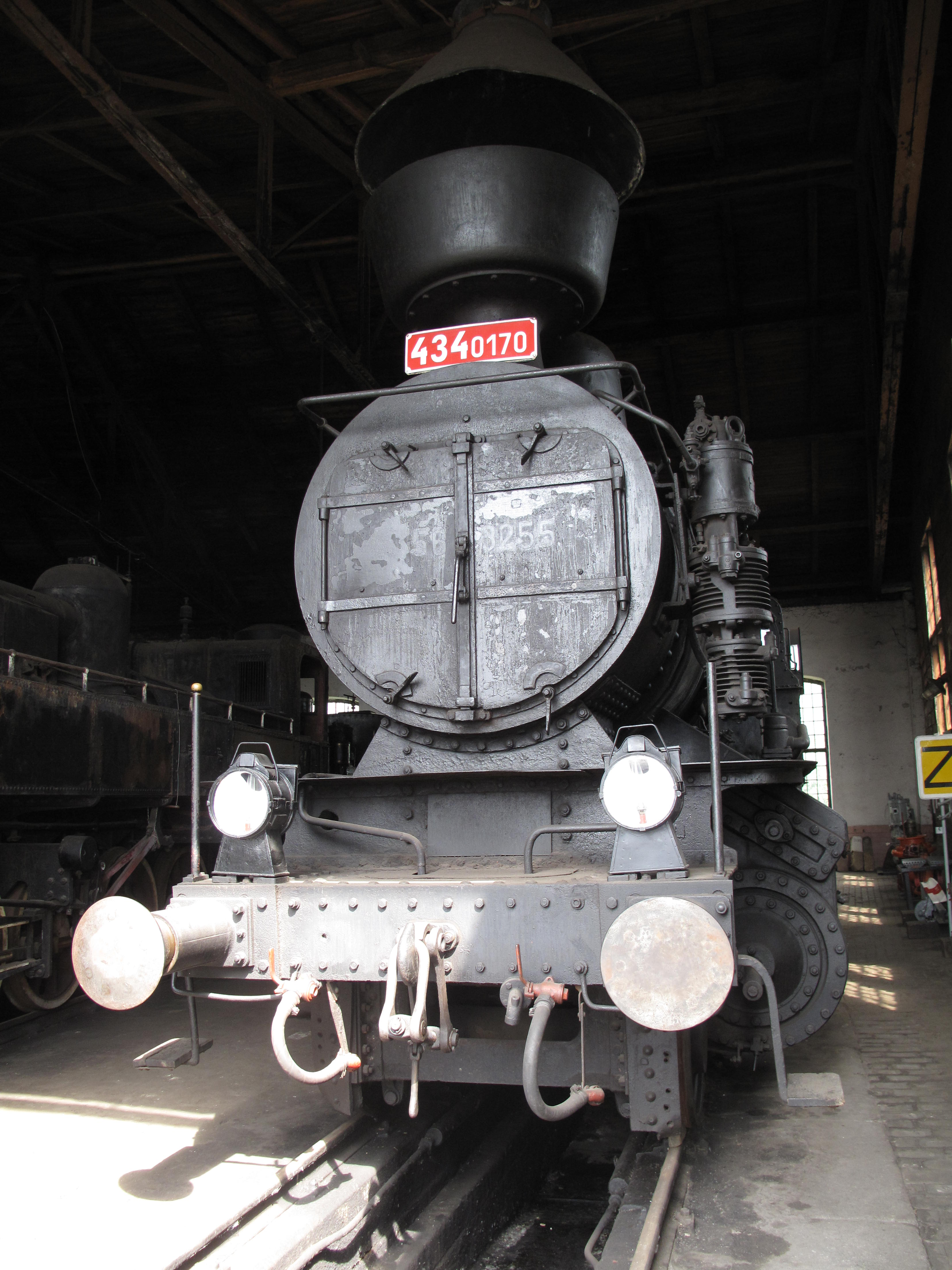 Železniční muzeum Výtopna Jaroměř